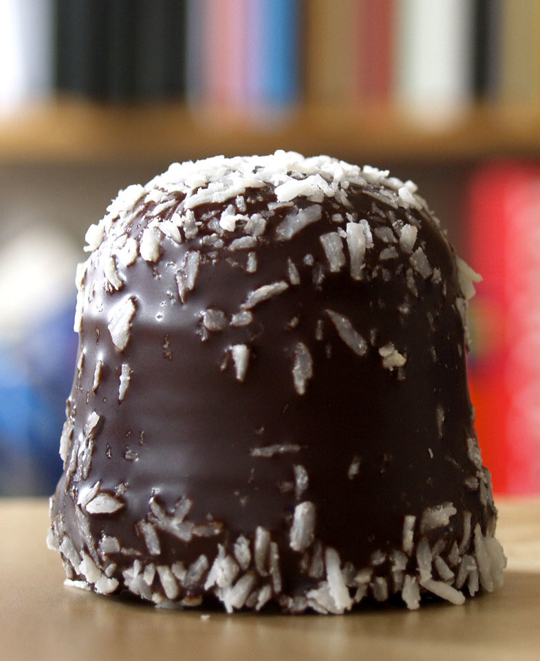 Flødebolle